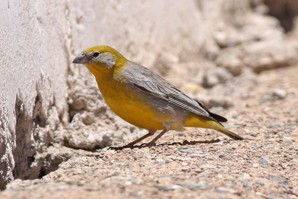 Uquia to Yavi, Salta